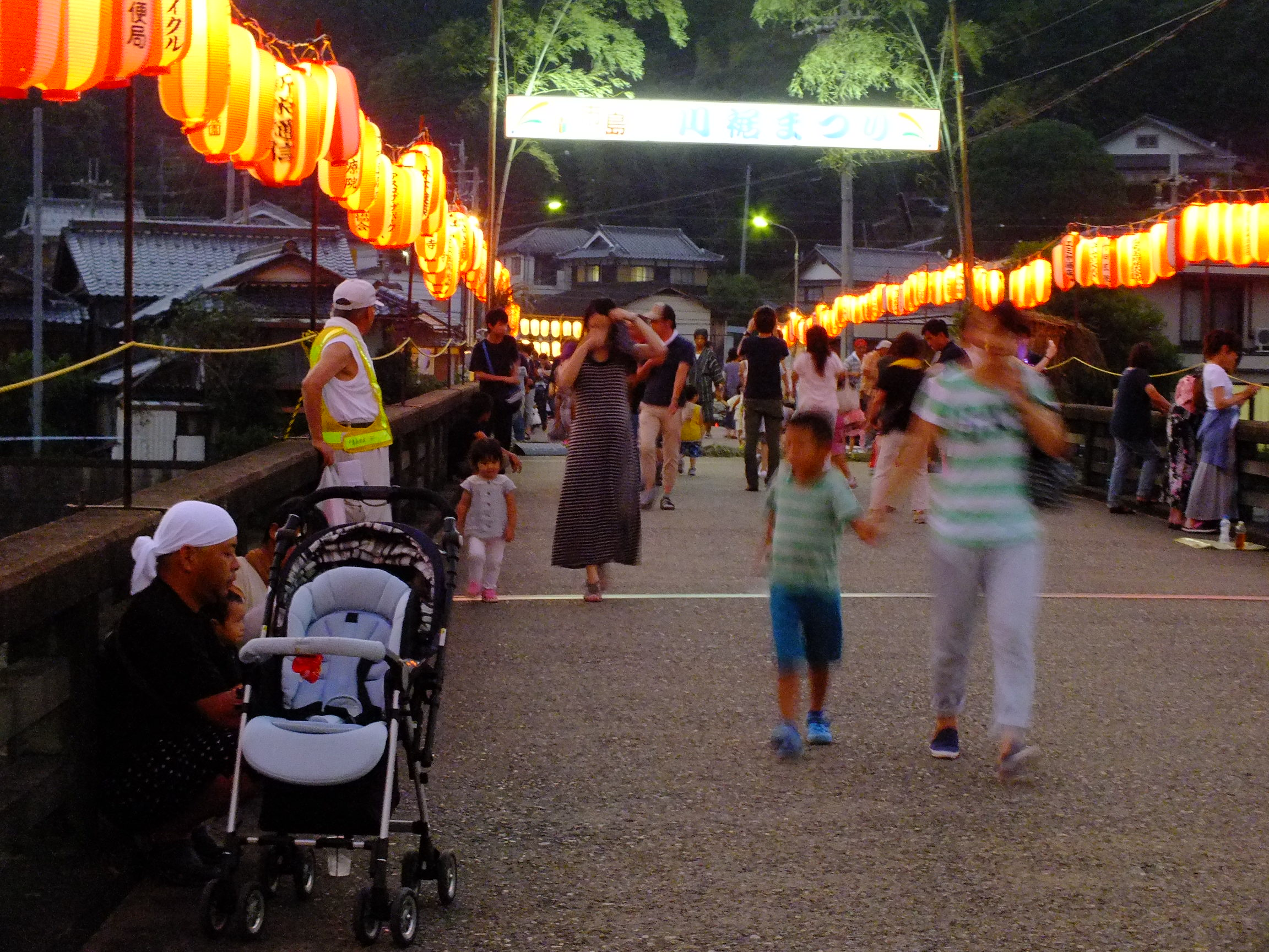 20140729 Ichijima-Kawasuso Matsuri 市島川裾祭（丹波市市島町）竹田川